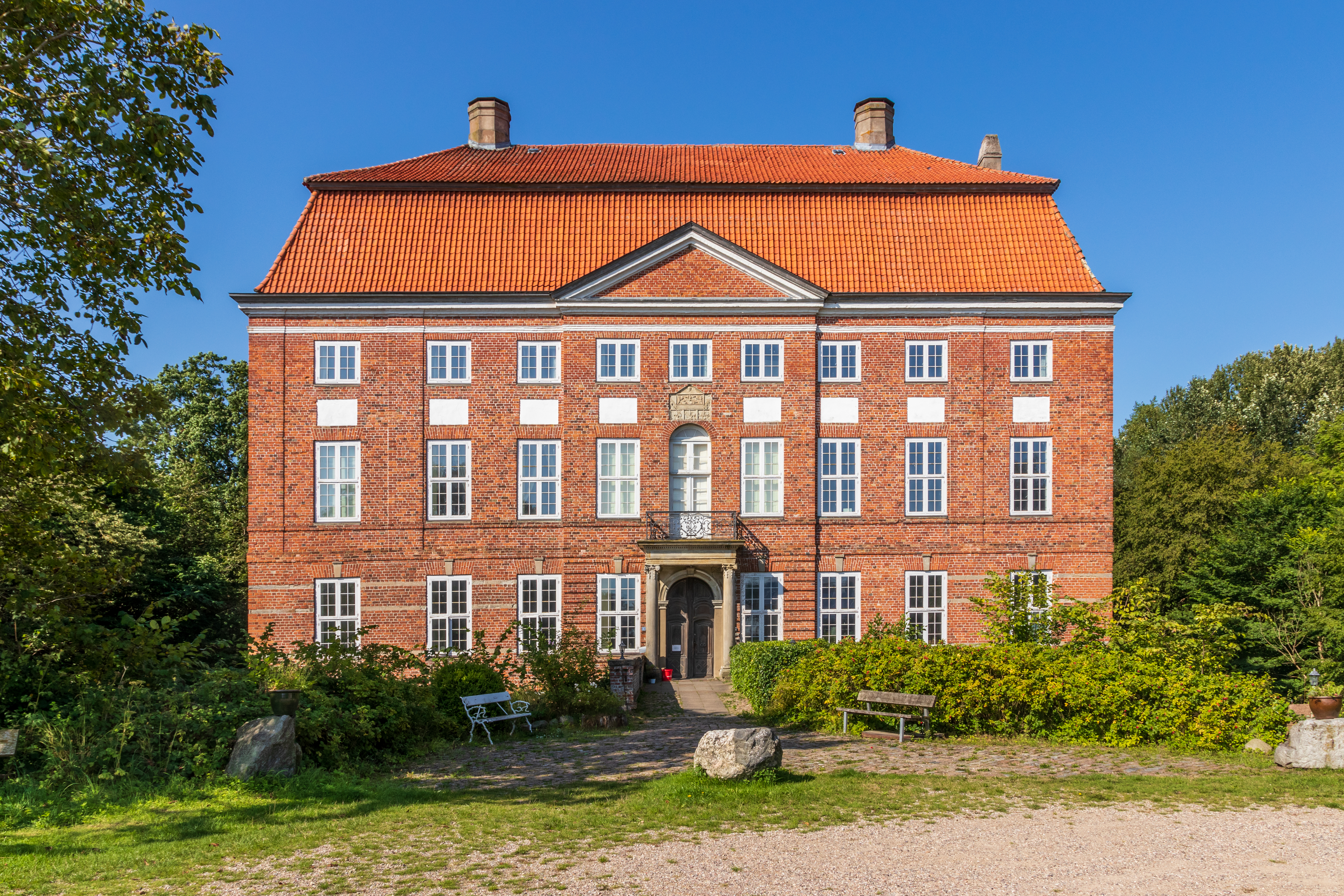 Gut Ludwigsburg – Haupthaus, Hoffassade